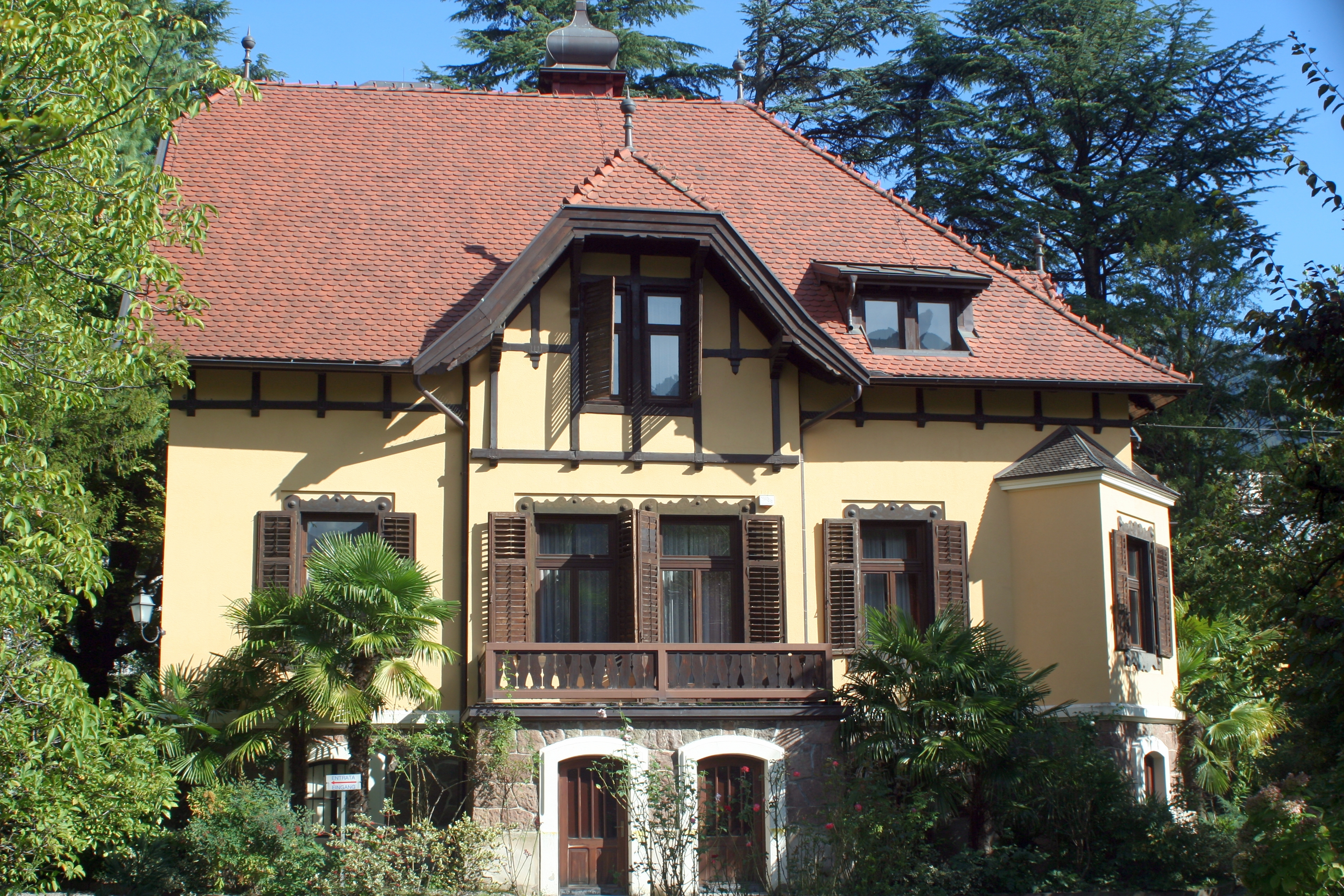 Villa San Marco, Innerhoferstraße 1 in Meran